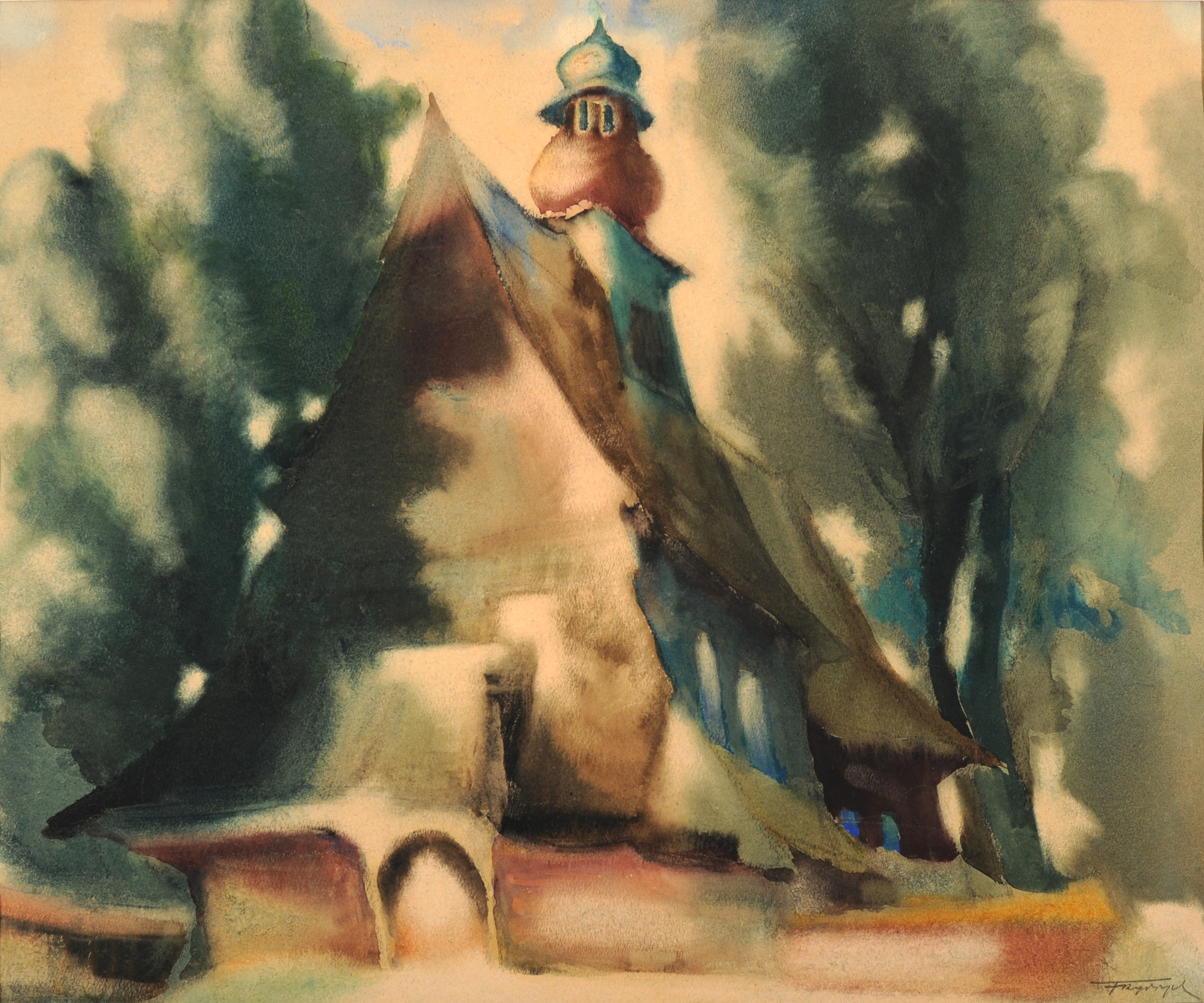 Kosciol_w_Przyszowicach_na_Slasku_1936